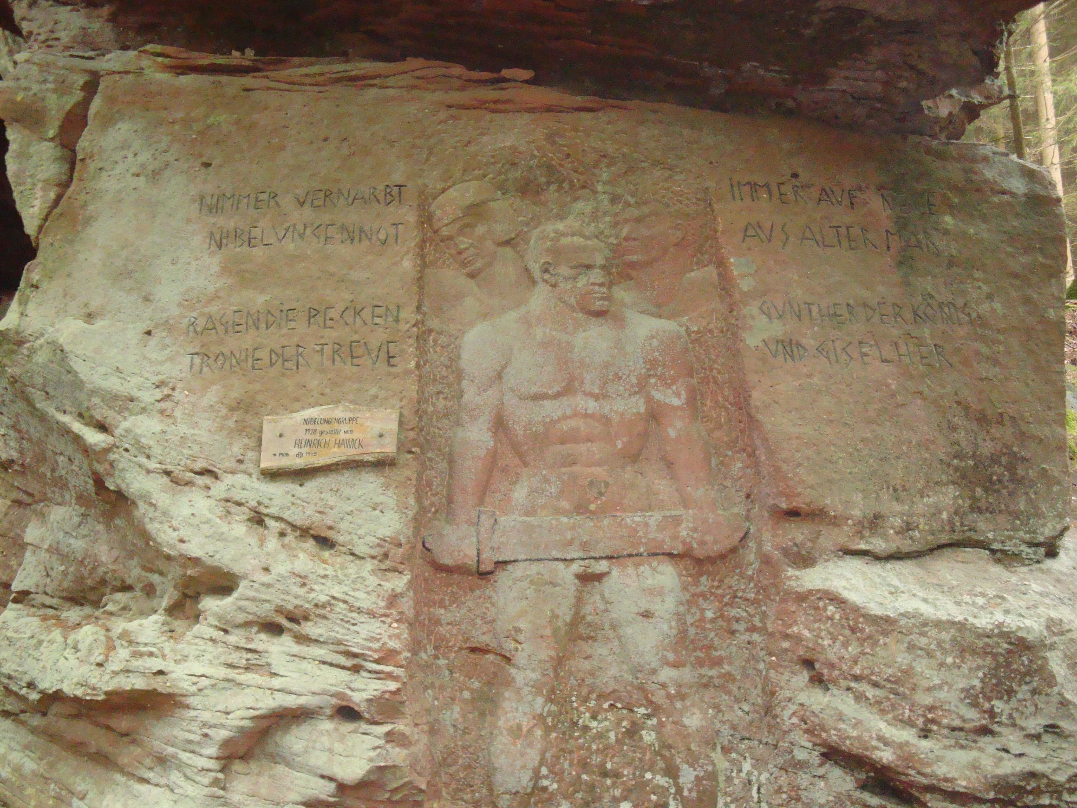 „Siegfried“ von Heinrich Hawick, Relief mit Figuren der Nibelungensage. Nibelungenfelsen gelegen an der Landstraße 504 von Waldleiningen nach Elmstein im Pfälzer Wald.